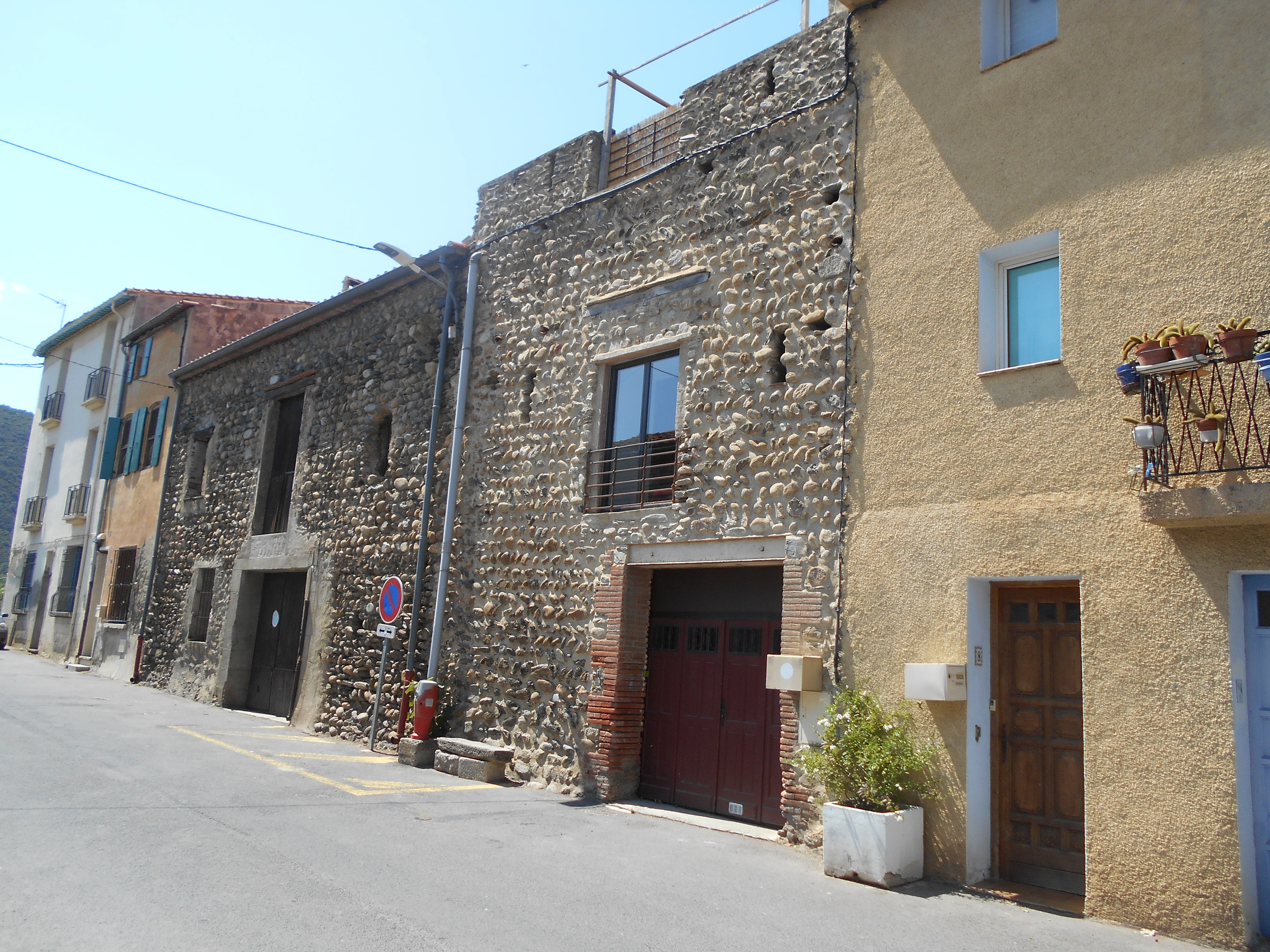 Muralles de Bulaternera